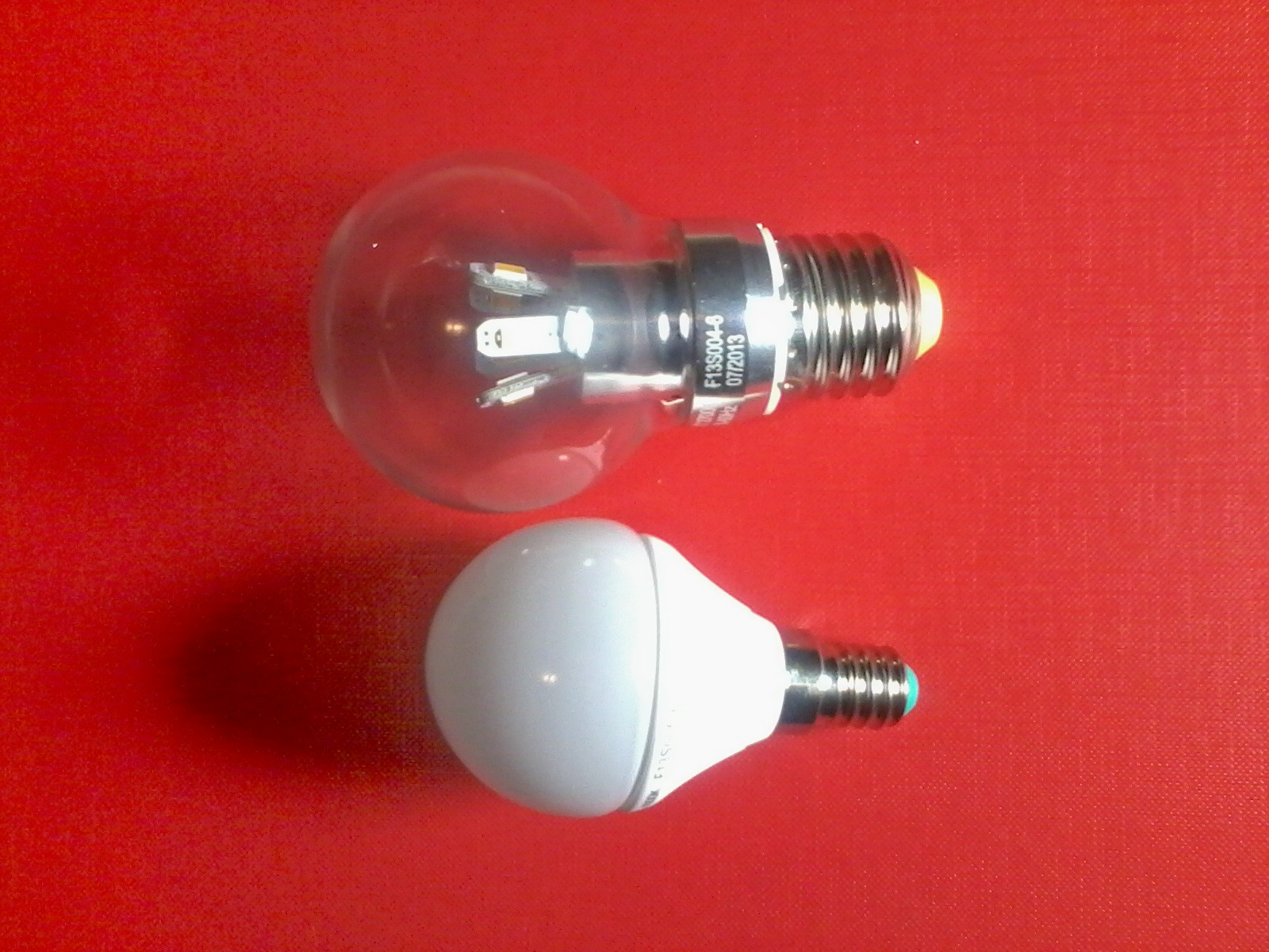 знято мобілкою Самсунг